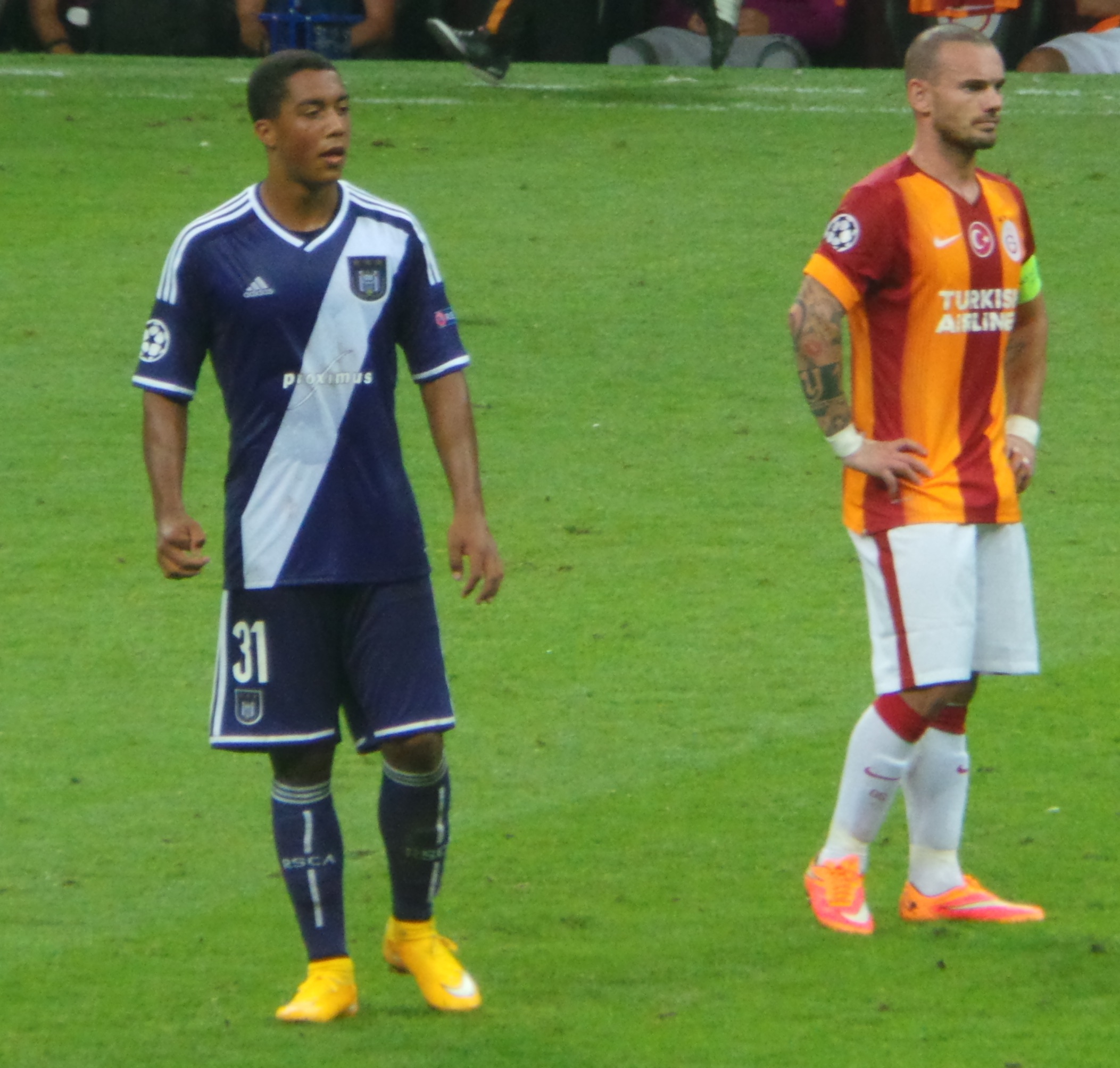 Youri Tielemans & Wesley Sneijder